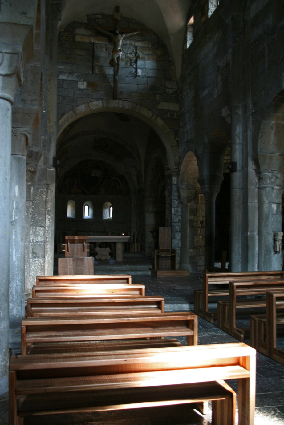 Navata centrale della chiesa abbaziale di Sant'Egidio